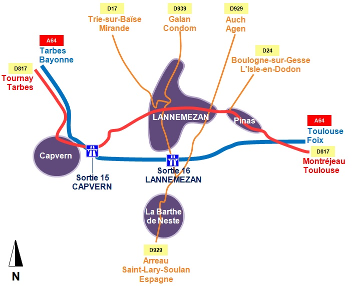 Acces routiers à Lannemezan